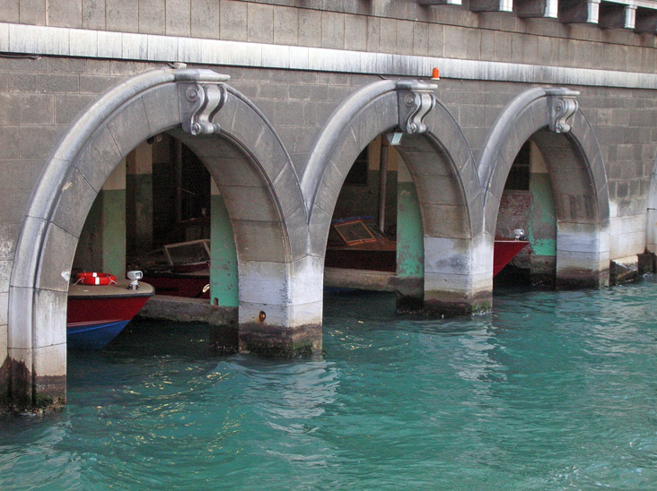 La "cavàna" (riparo per le imbarcazioni) dei Vigili del Fuoco a Venezia.